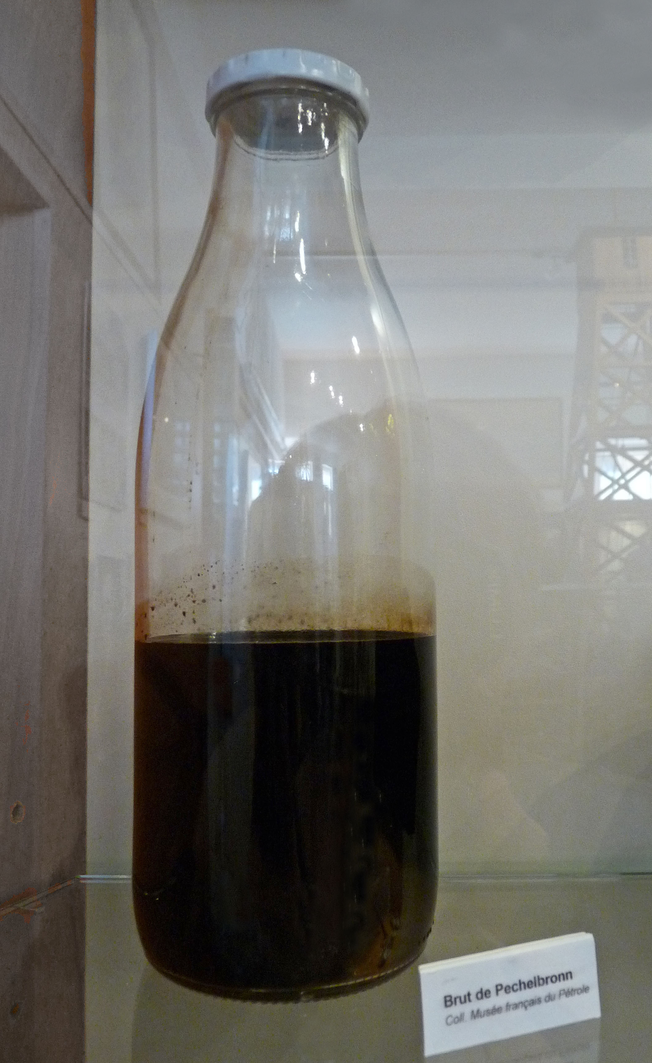 Musée français du pétrole à Merkwiller-Pechelbronn (Bas-Rhin) : Brut de Pechelbronn.